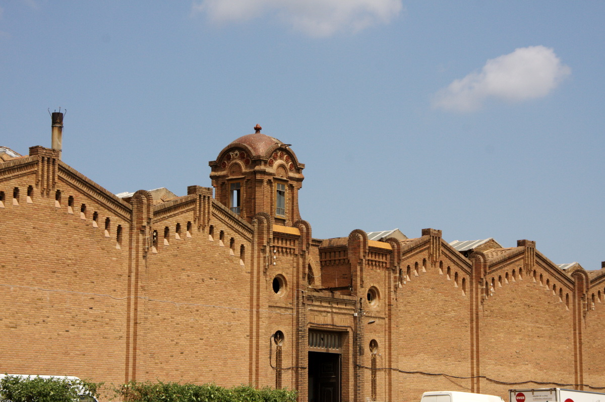 Fàbrica Bagaria, obra de 1911 de Modest Feu i Estrada (1870-1933) a Cornellà de Llobregat (Catalunya).